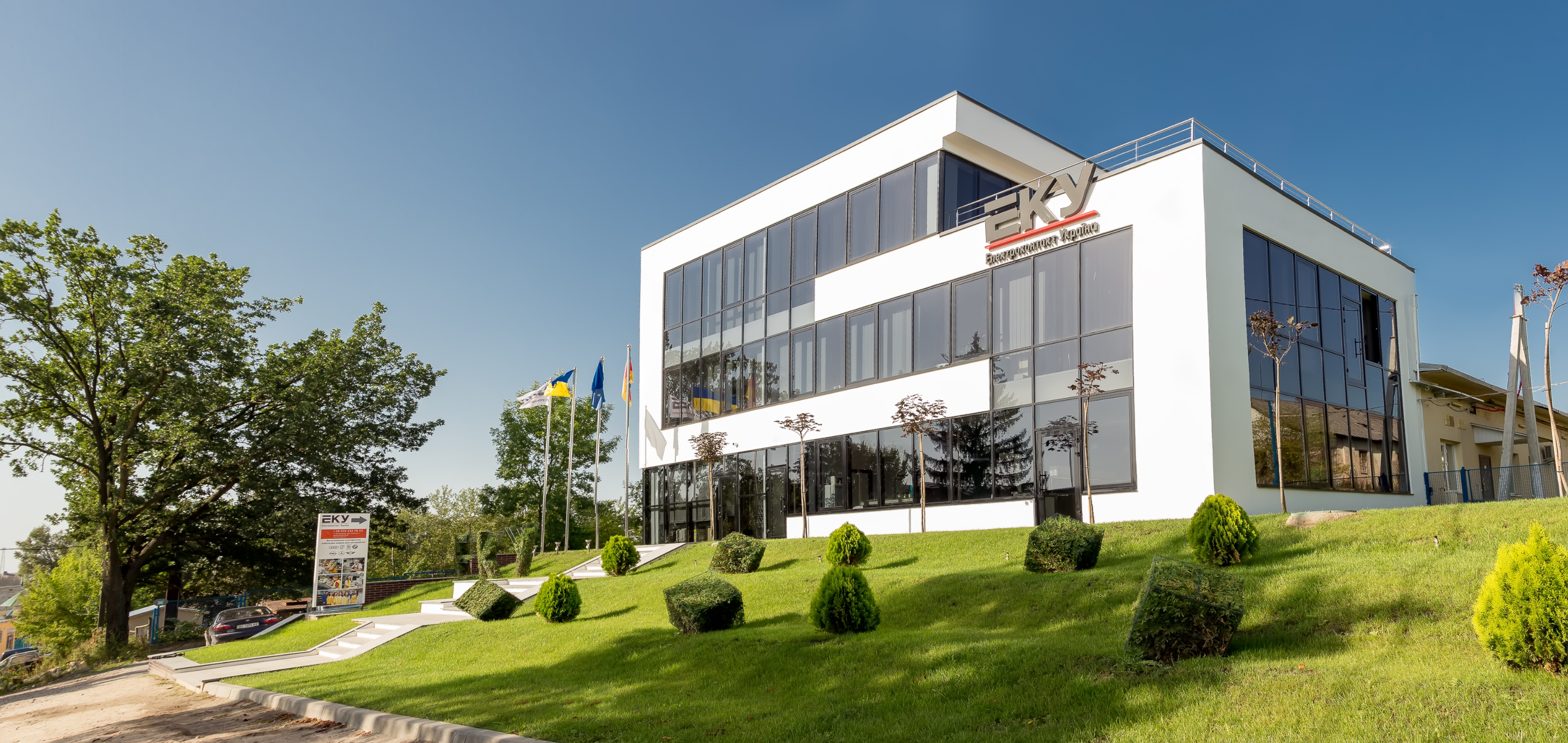 Дата фото - 2017 рік.